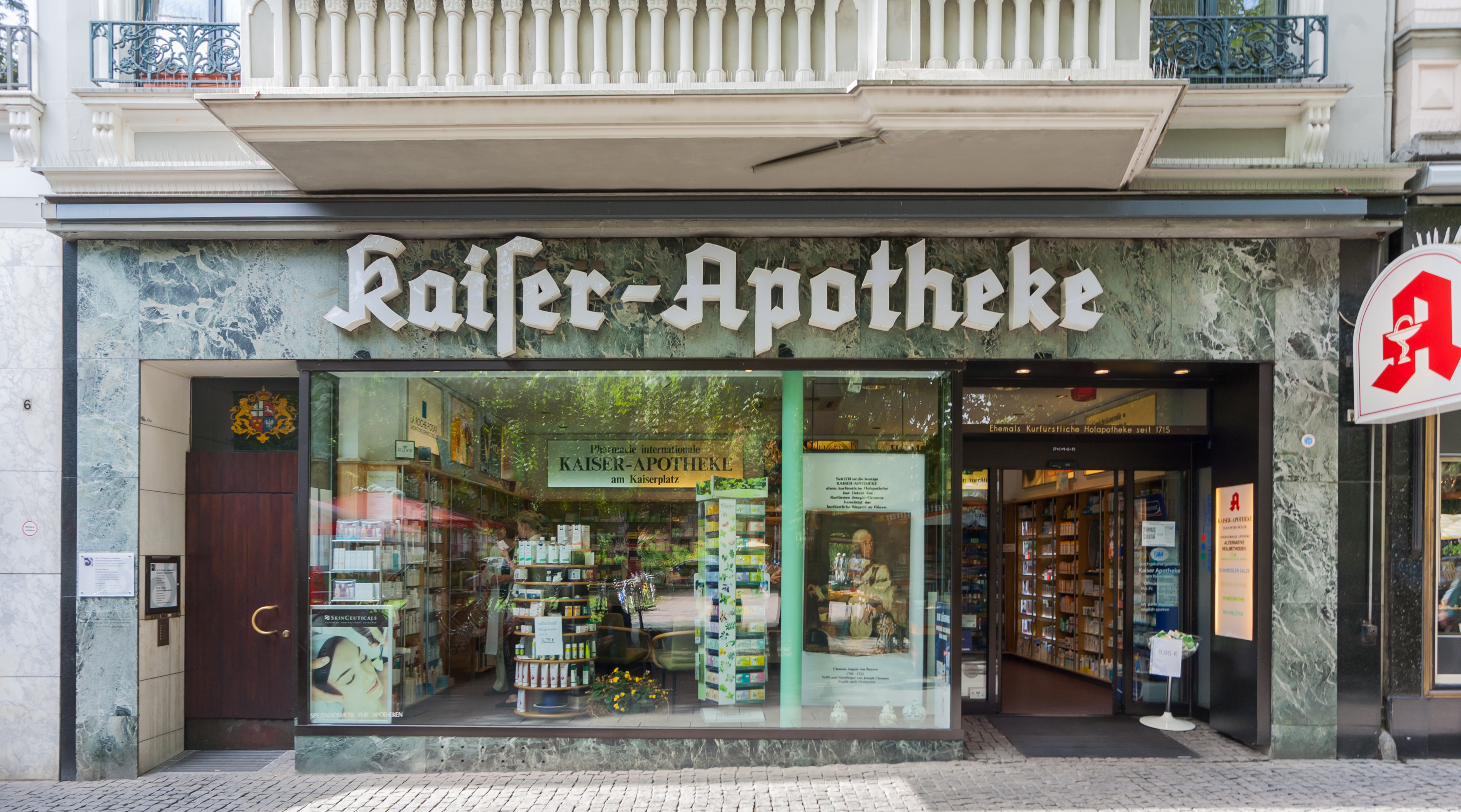 Kaiser-Apotheke, Kaiserplatz 4, Bonn